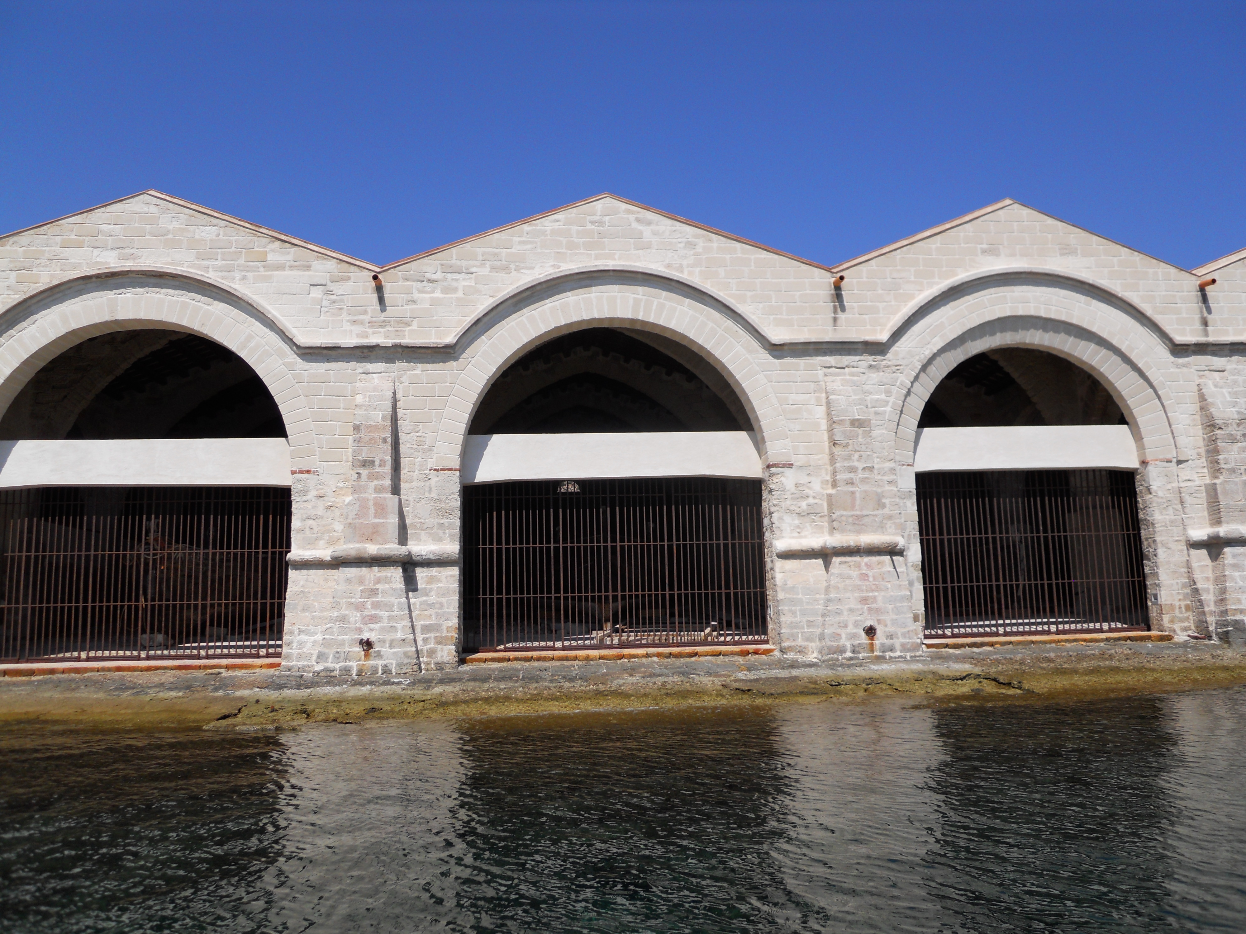 Veduta della ex - Tonnara